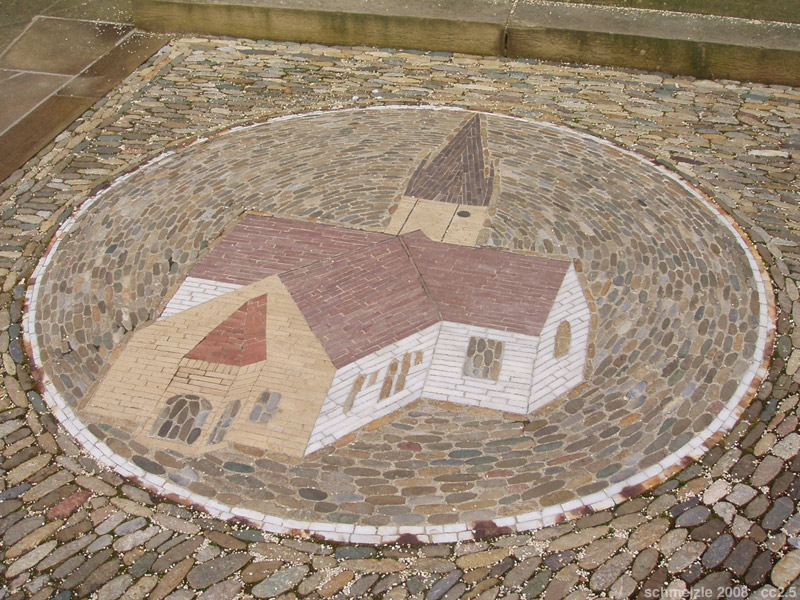 Kath. Pfarrkirche Unsere Liebe Frau in Eppingen, Darstellung des Gebäudes als Gehwegmosaik vor der Kirche